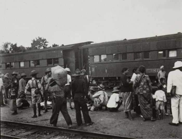 Foto. Passagiers bij een trein op station Praboemoelih